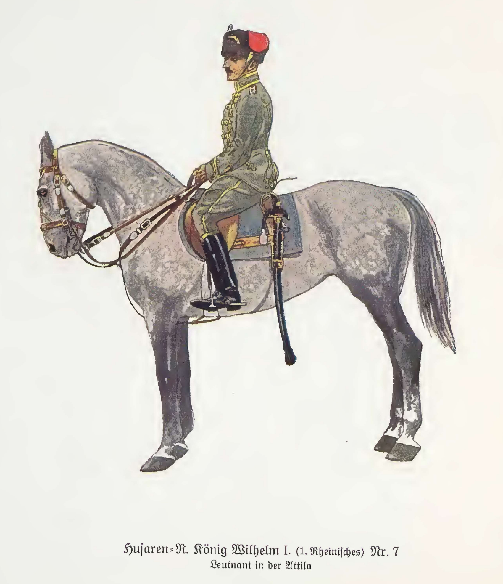 Reiter des Husaren-Regiments „König Wilhelm I.“ (1. Rheinisches) Nr. 7 in feldgrauer Uniform, 1915